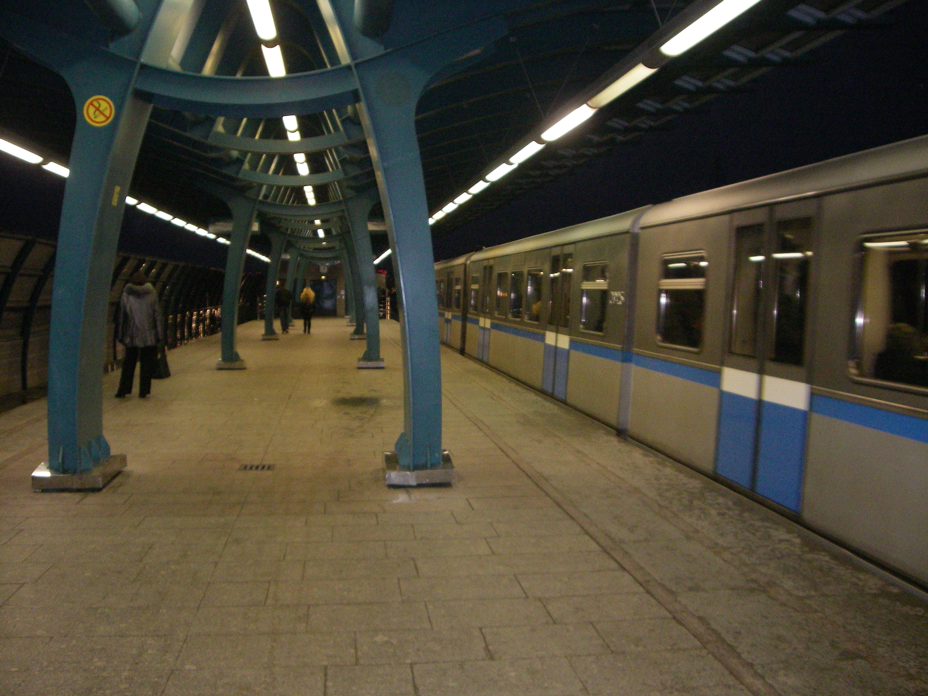 Metrostacio "Ulica Gorĉakova", Butovskaja linio, Moskvo